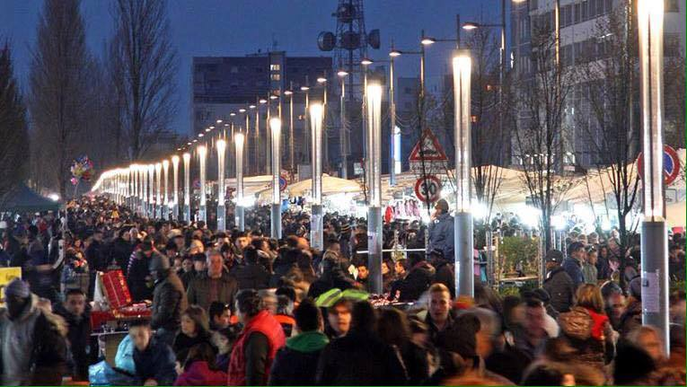 Fiera di San Giuseppe Cosenza